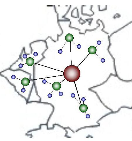 Hub&Spoke Netz in der Logistik